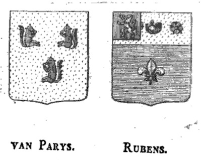 Rubens Family/ Nobiliaire des Pays-Bas, et du Comté de Bourgogne ..., Volume 6